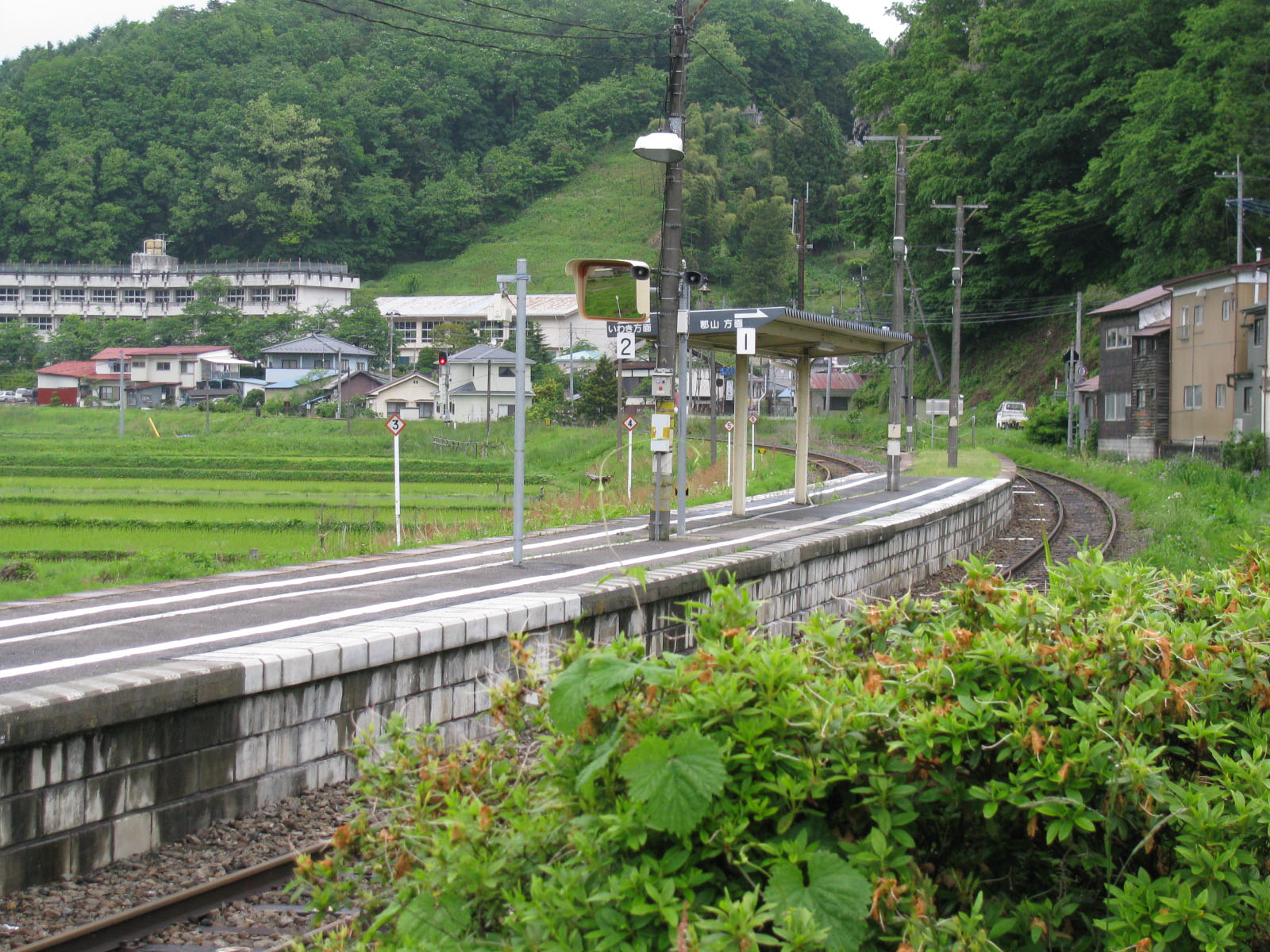 磐越東線要田駅